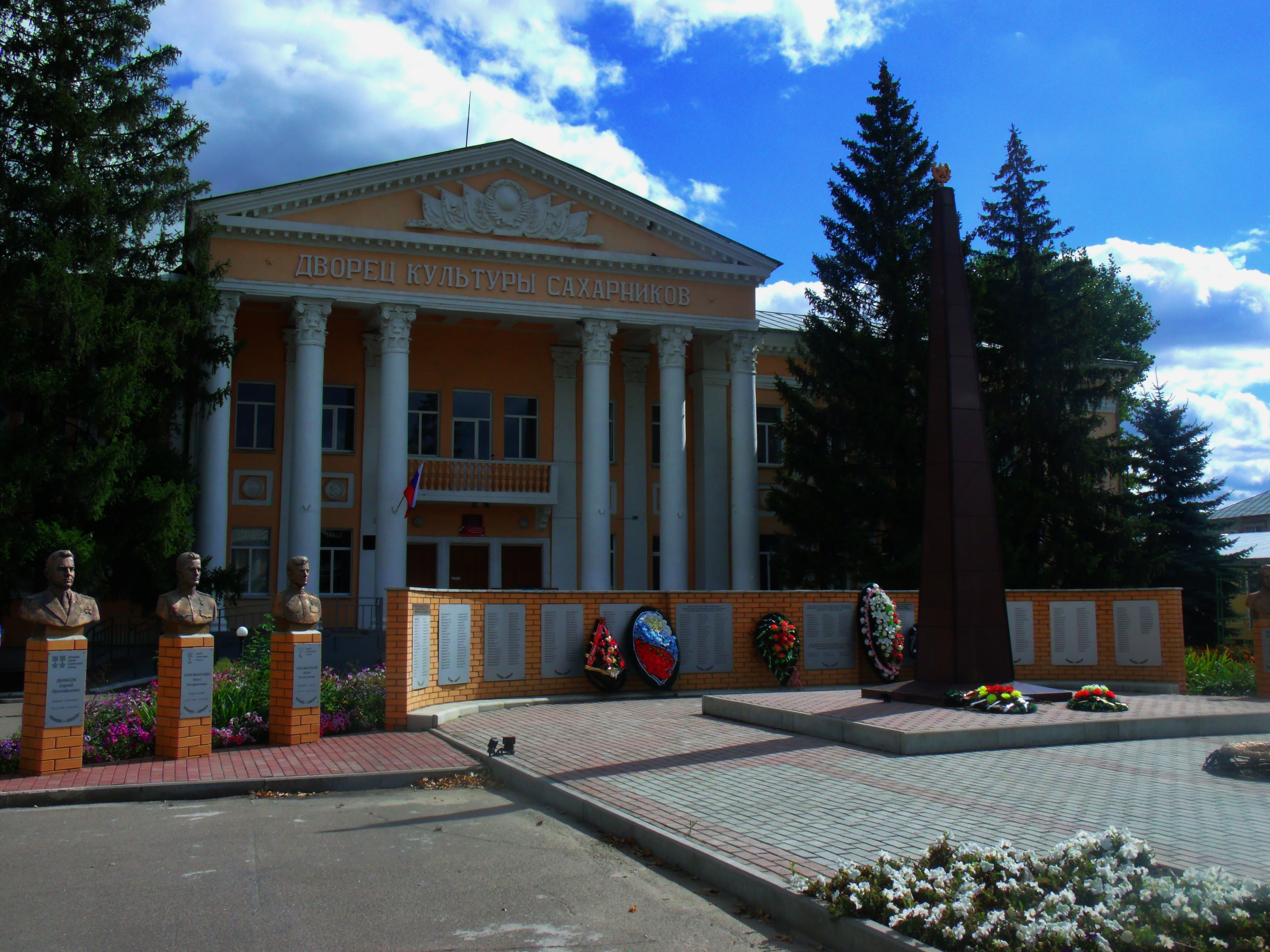 Братская могила советских воинов: Ольховатка, Ольховатский район, Воронежская область